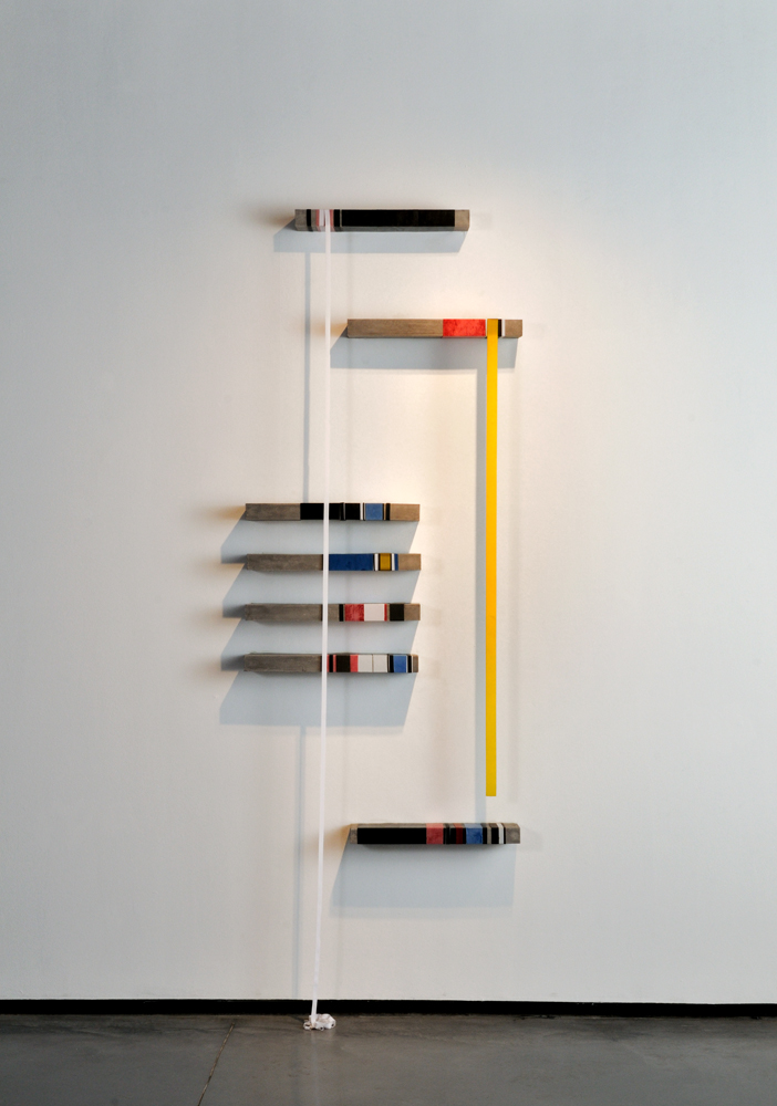 "אותות" - פסל